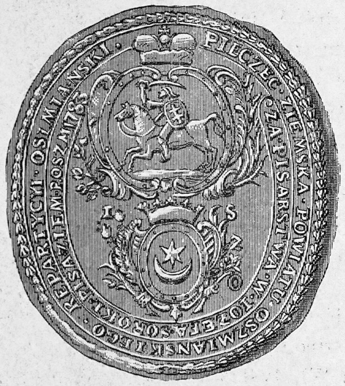 Беларуская (тарашкевіца): Пячатка земская Ашмянскага павету з гербам «Пагоня» («Pahonia»)